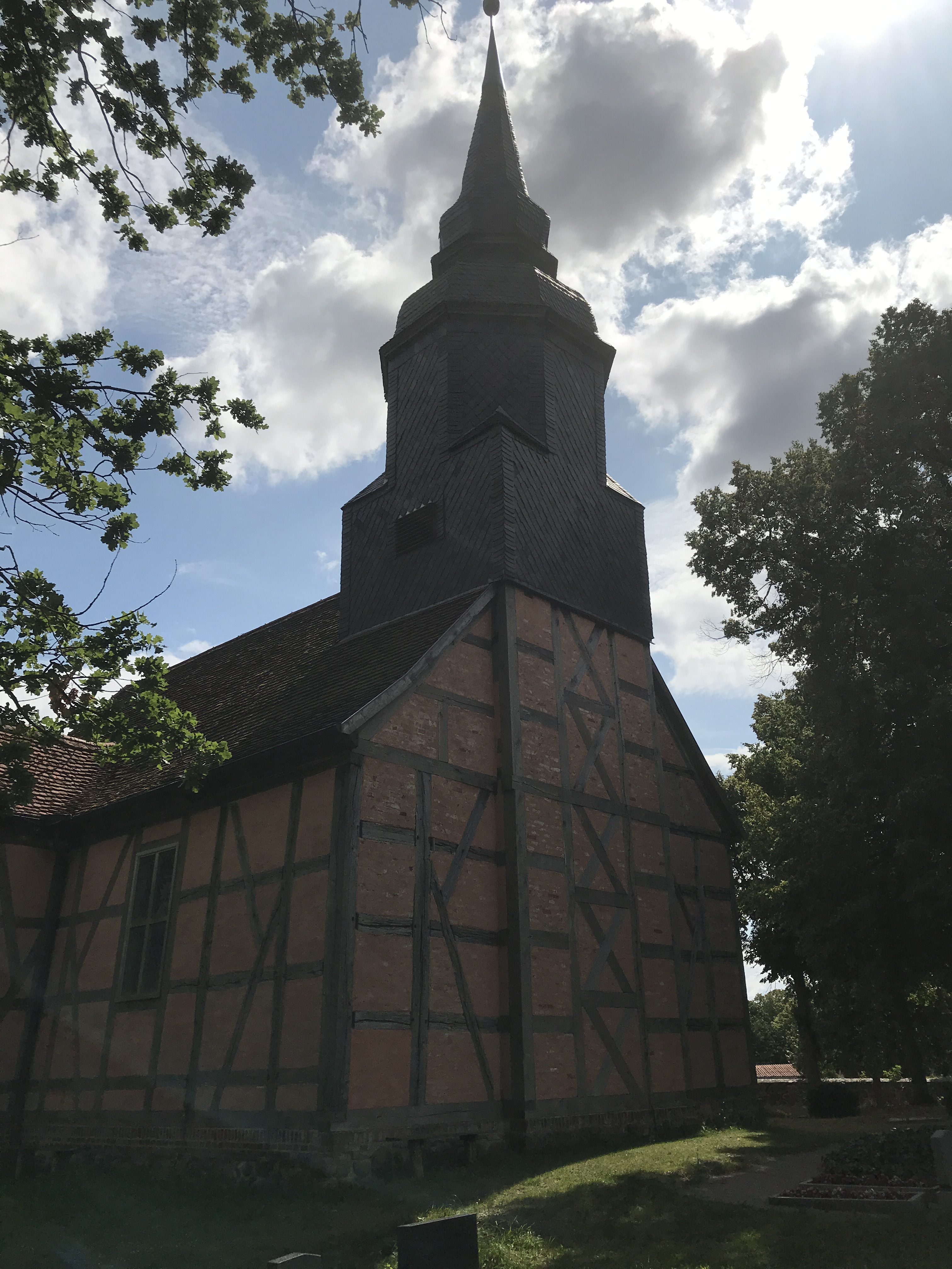 Die Dorfkirche Schönhausen ist eine Fachwerkkirche in Schönhausen im Landkreis Mecklenburgische Seenplatte in Mecklenburg-Vorpommern. Im Innern stehen unter anderem ein Kanzelaltar sowie eine Patronatsloge aus der Bauzeit.